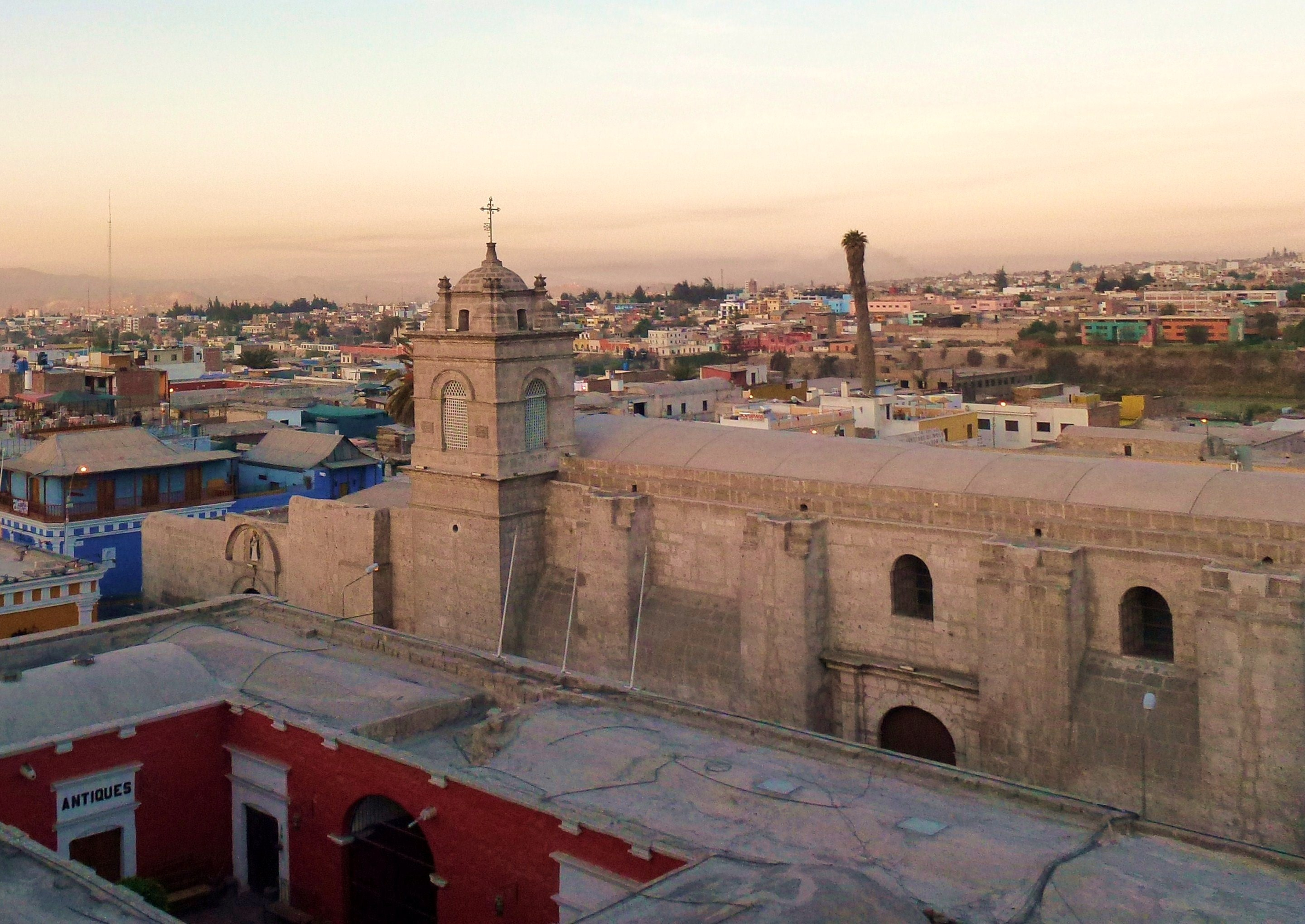 Arequipa Pérou